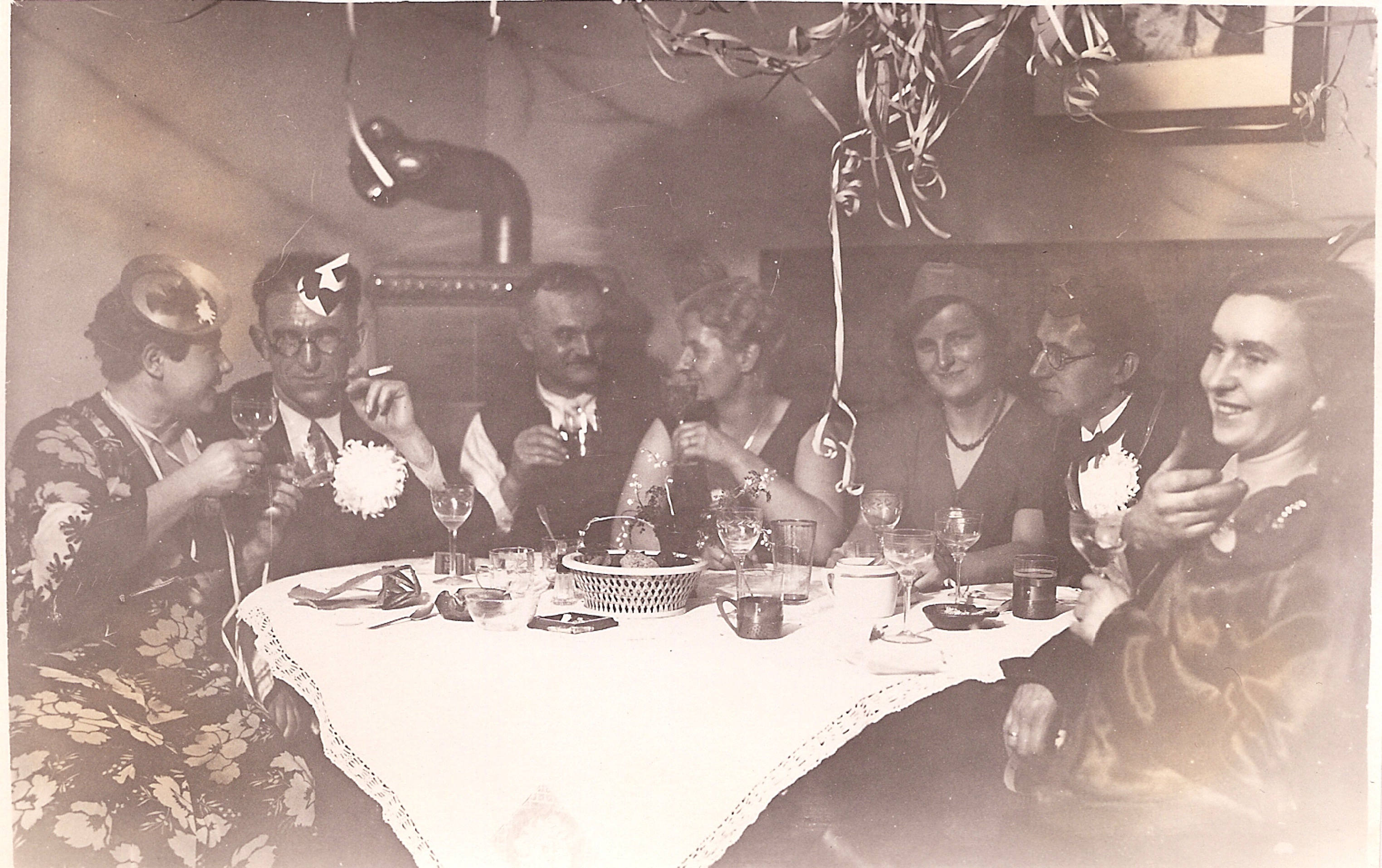 Wellhausen, Bruschke, Lehmann, Meisterfeld mit Ehefrauen, Silvester 1934, Magdeburg